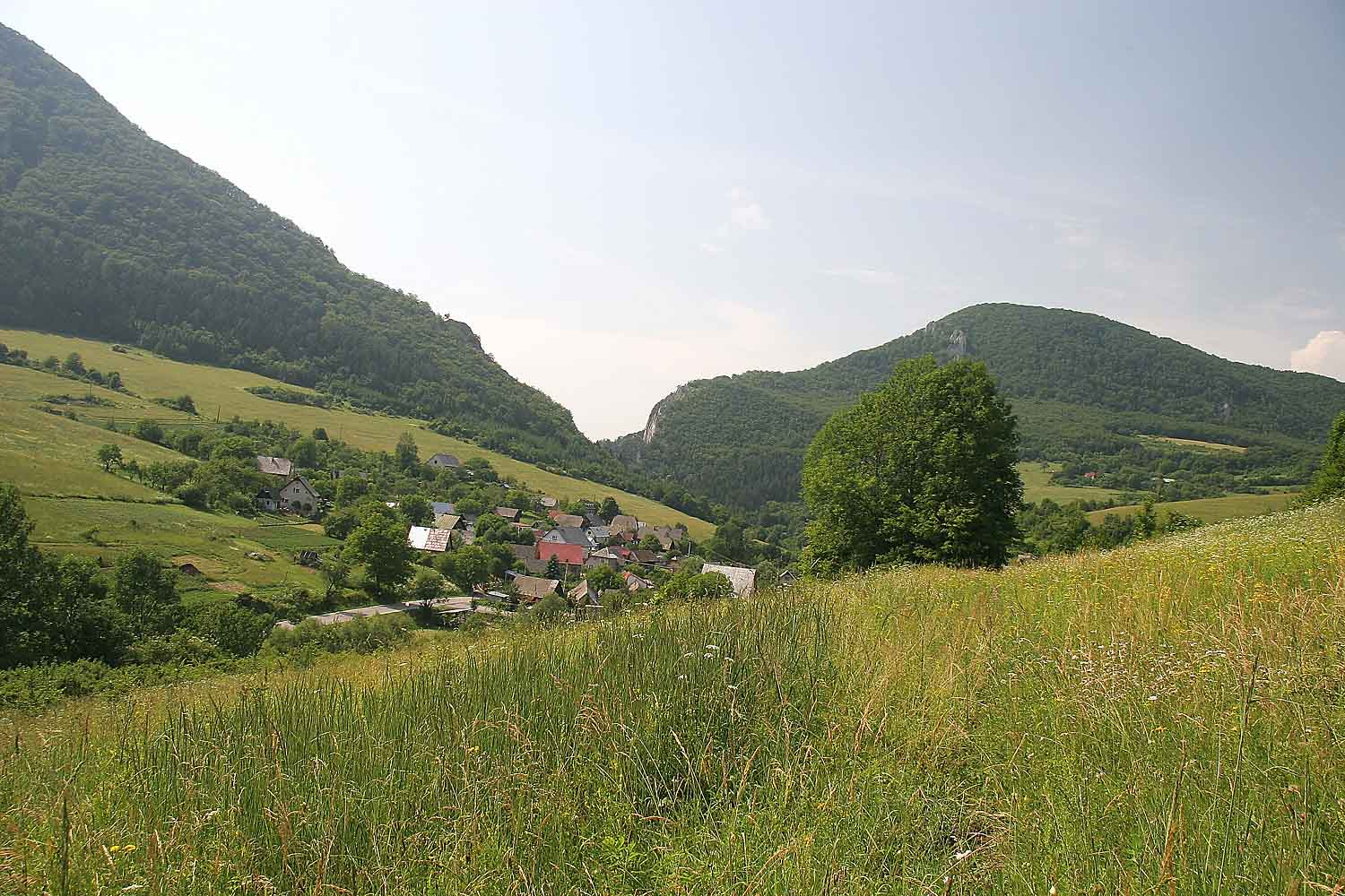 Manínská tiesňava - view from Zaskalie, Súlovské vrchy, district Povážská Bystrica, Slovakia autor:Prazak Date: 27. 6. 2006